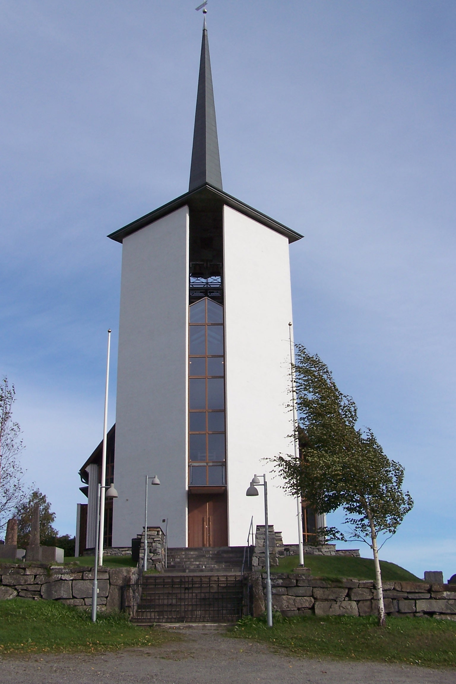 Såner kirke, Hølen, Akershus, Norway